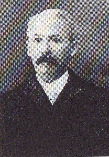 横浜バプテスト神学校を創設したベネット宣教師